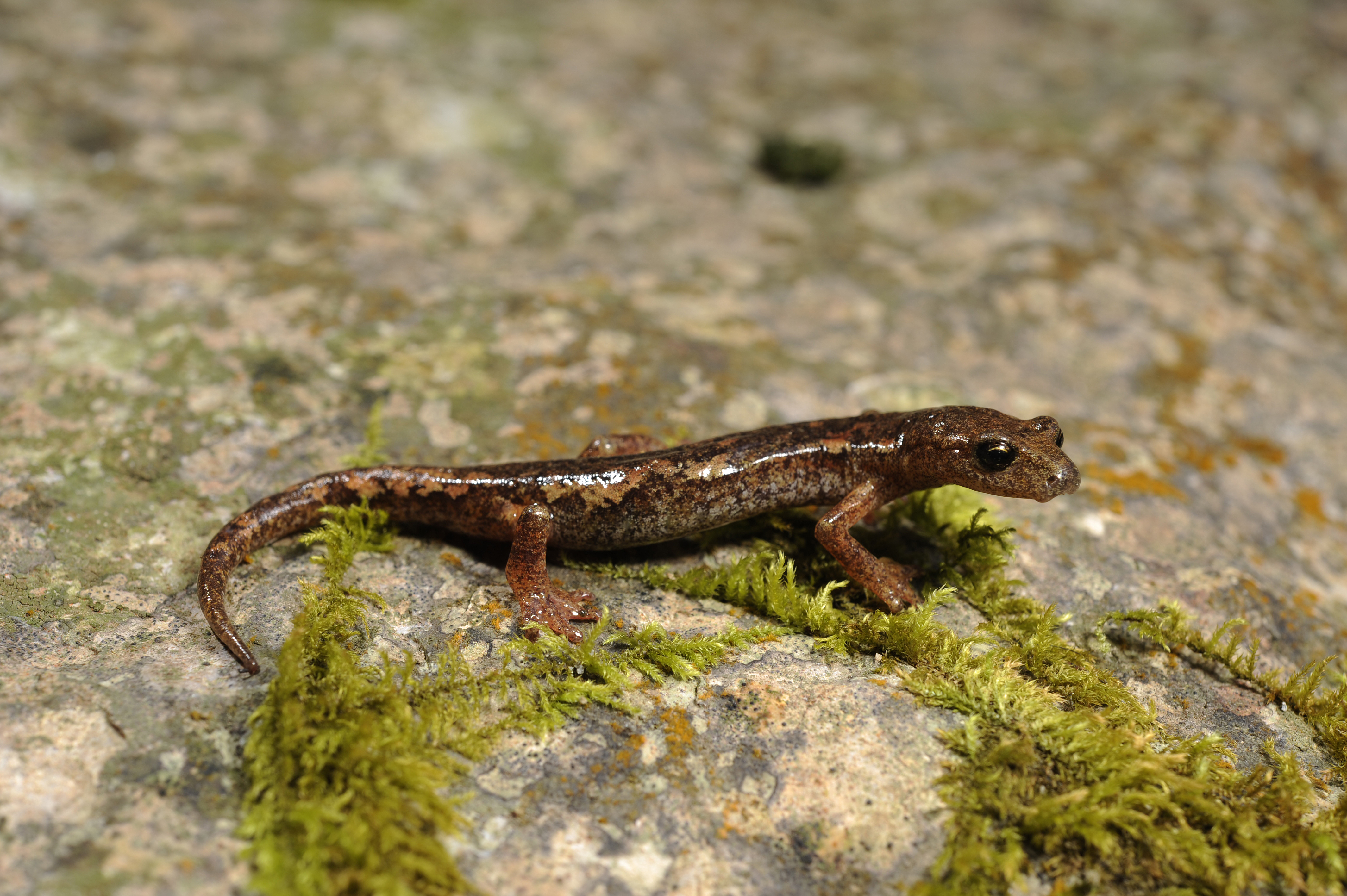 Ambrosis Höhlensalamander (Speleomantes ambrosii) aus Italien.jpg